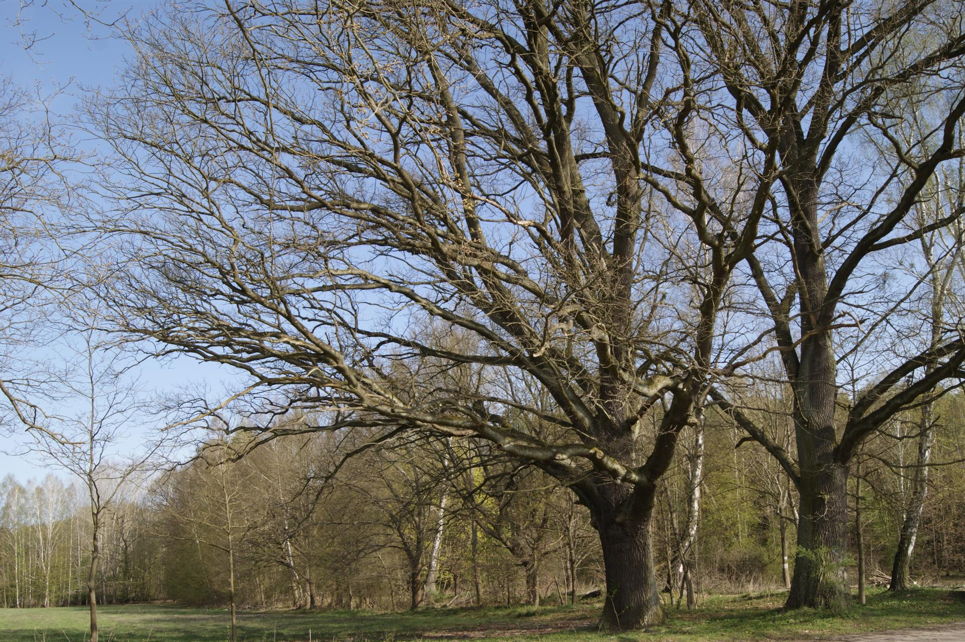 Pomnikowe dęby